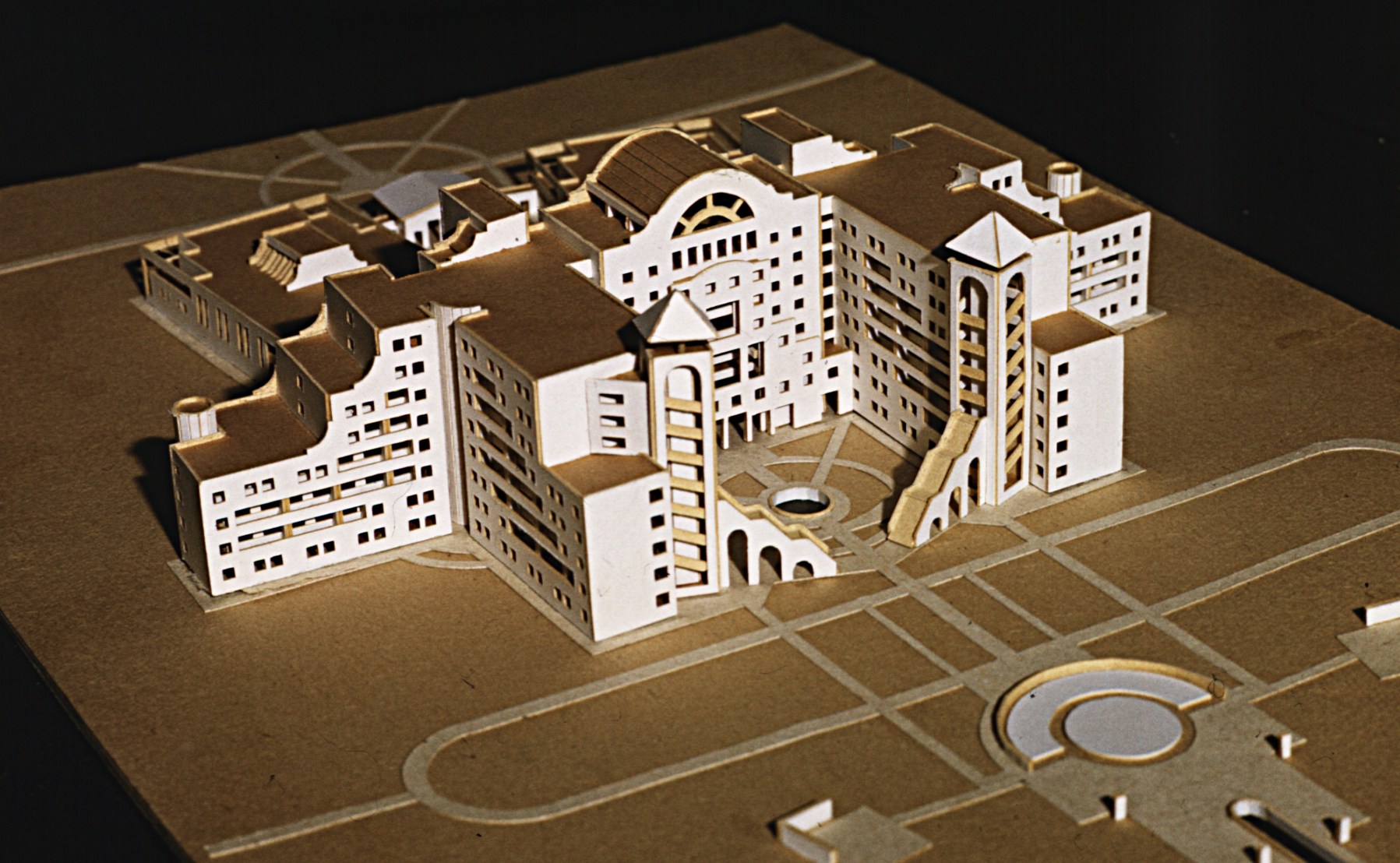 Санаторий в Елабуге. Руководитель авторского коллектива Петр Войс. 1987г.